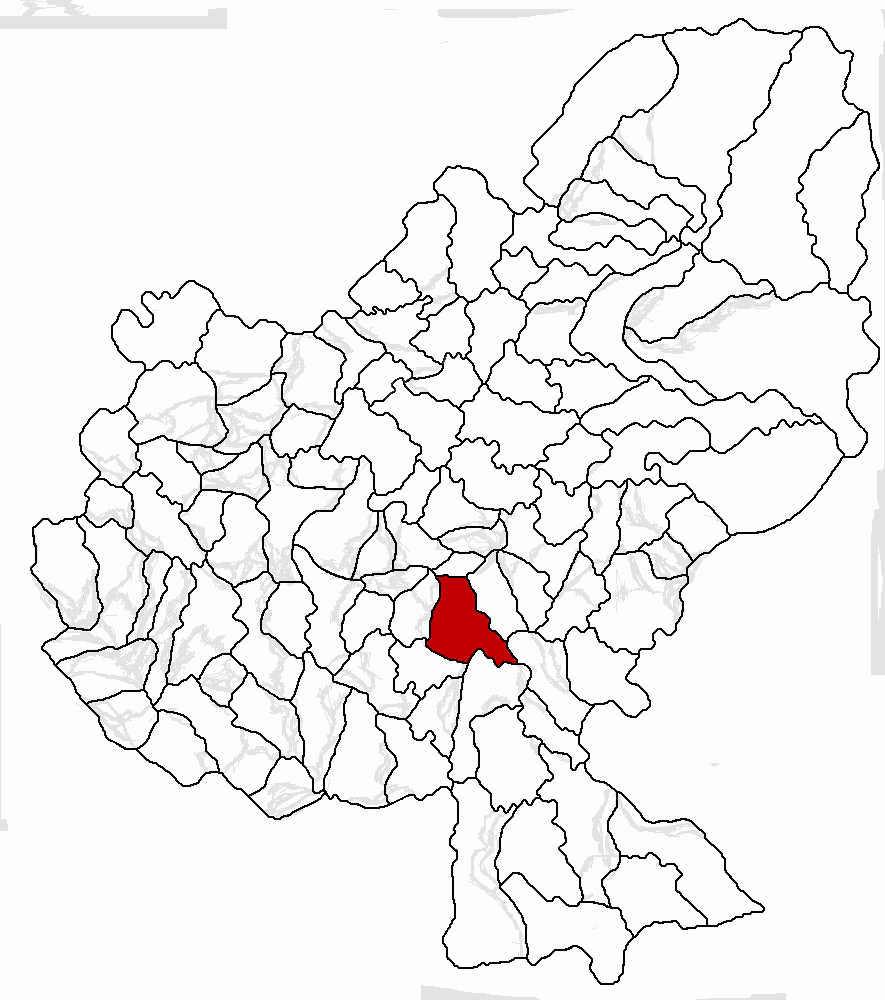 Categorie:Hărţi ale judeţului Mureş